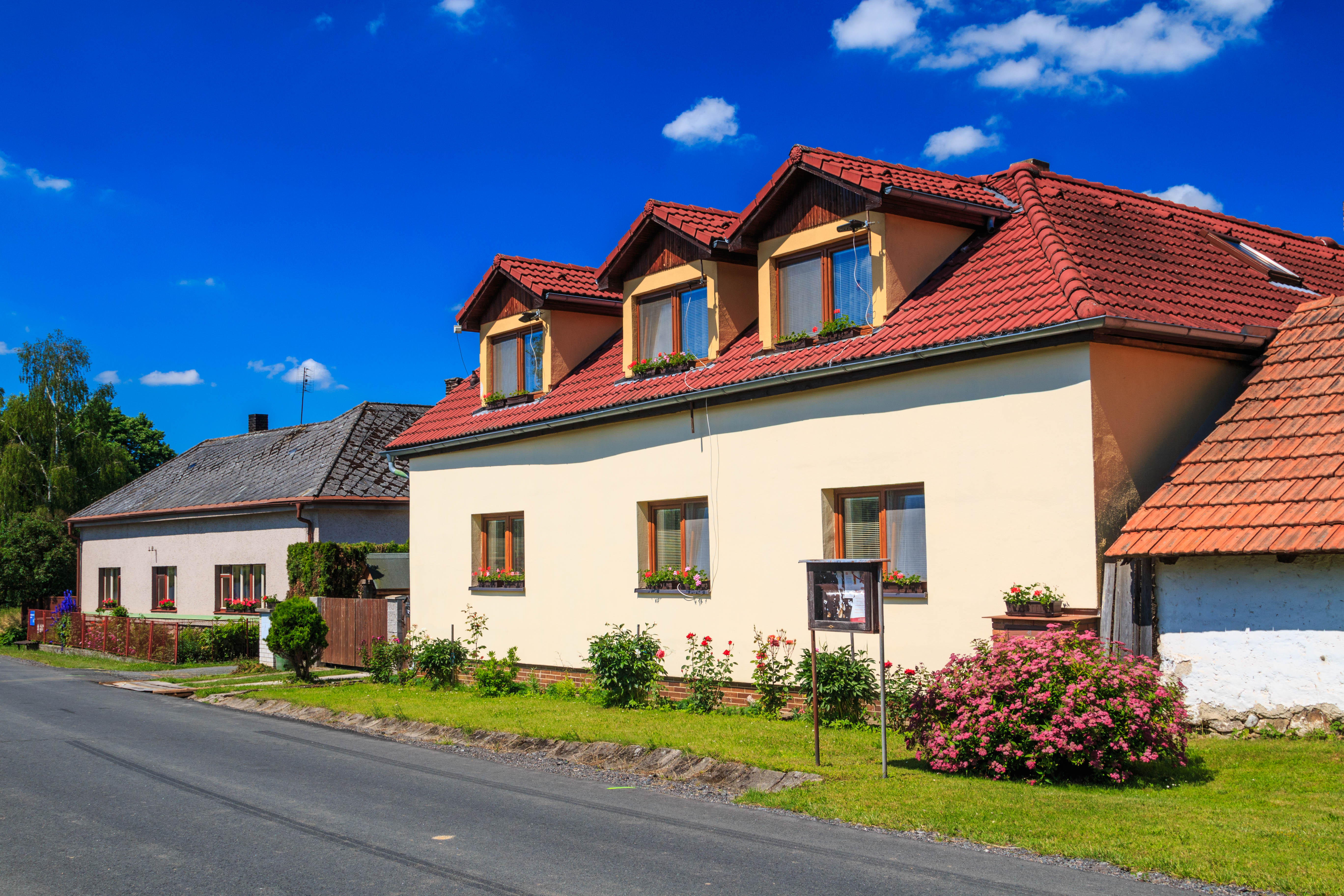 Jarošov čp. 15